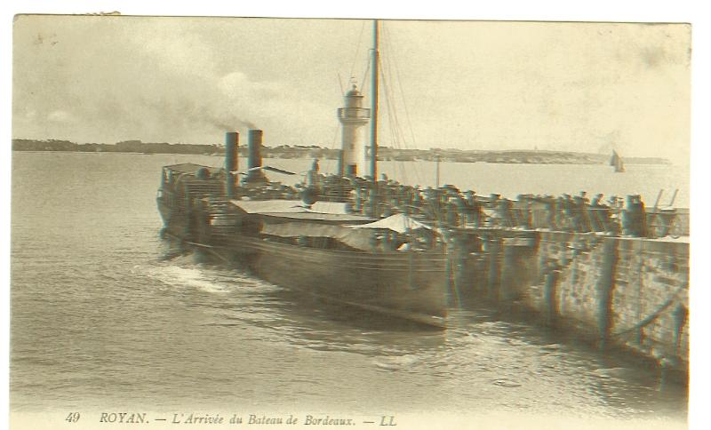 Royan le Bateau de Bordeaux vers 1900